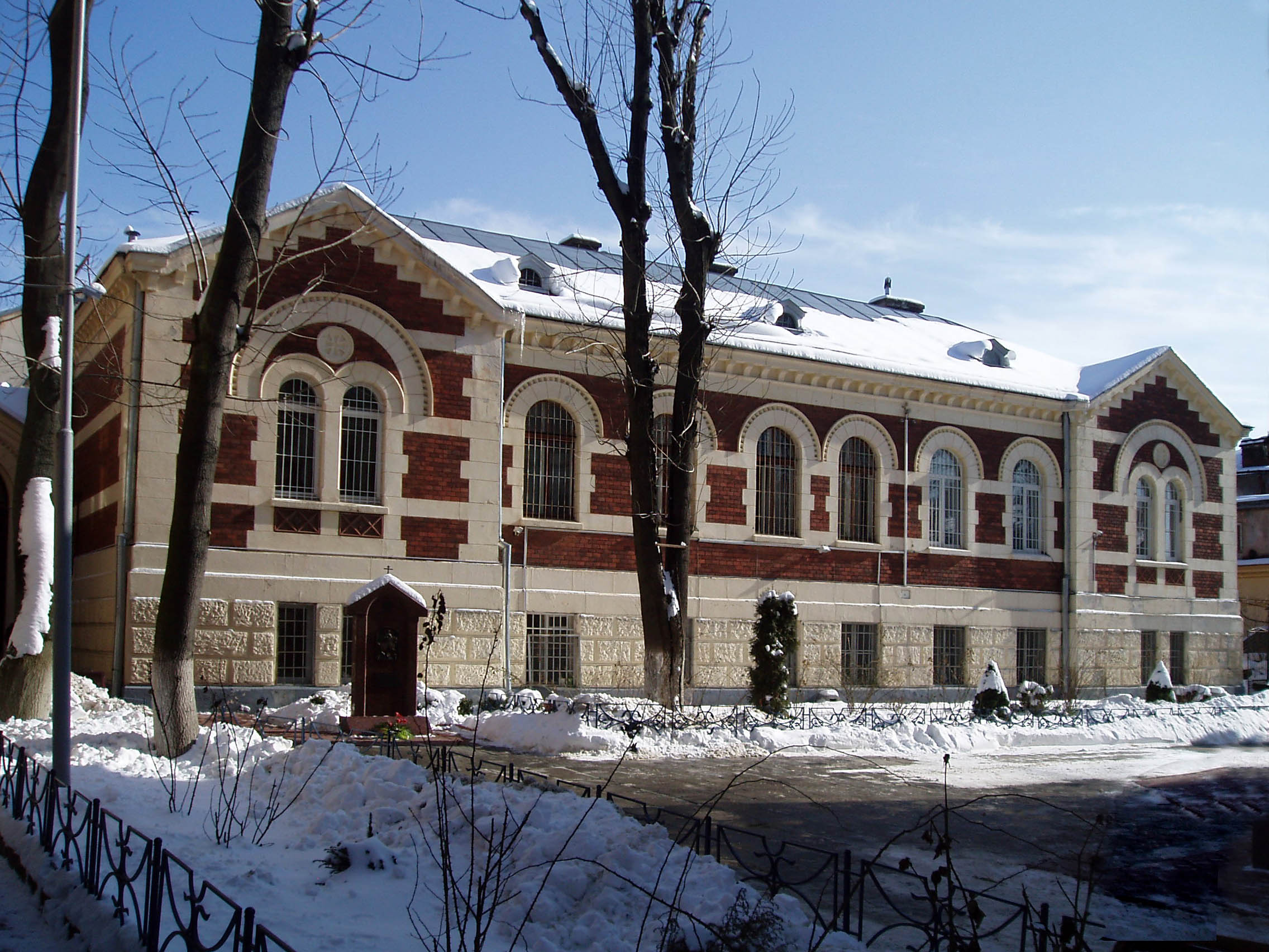 Плебанія церкви святого Георгія у Львові.